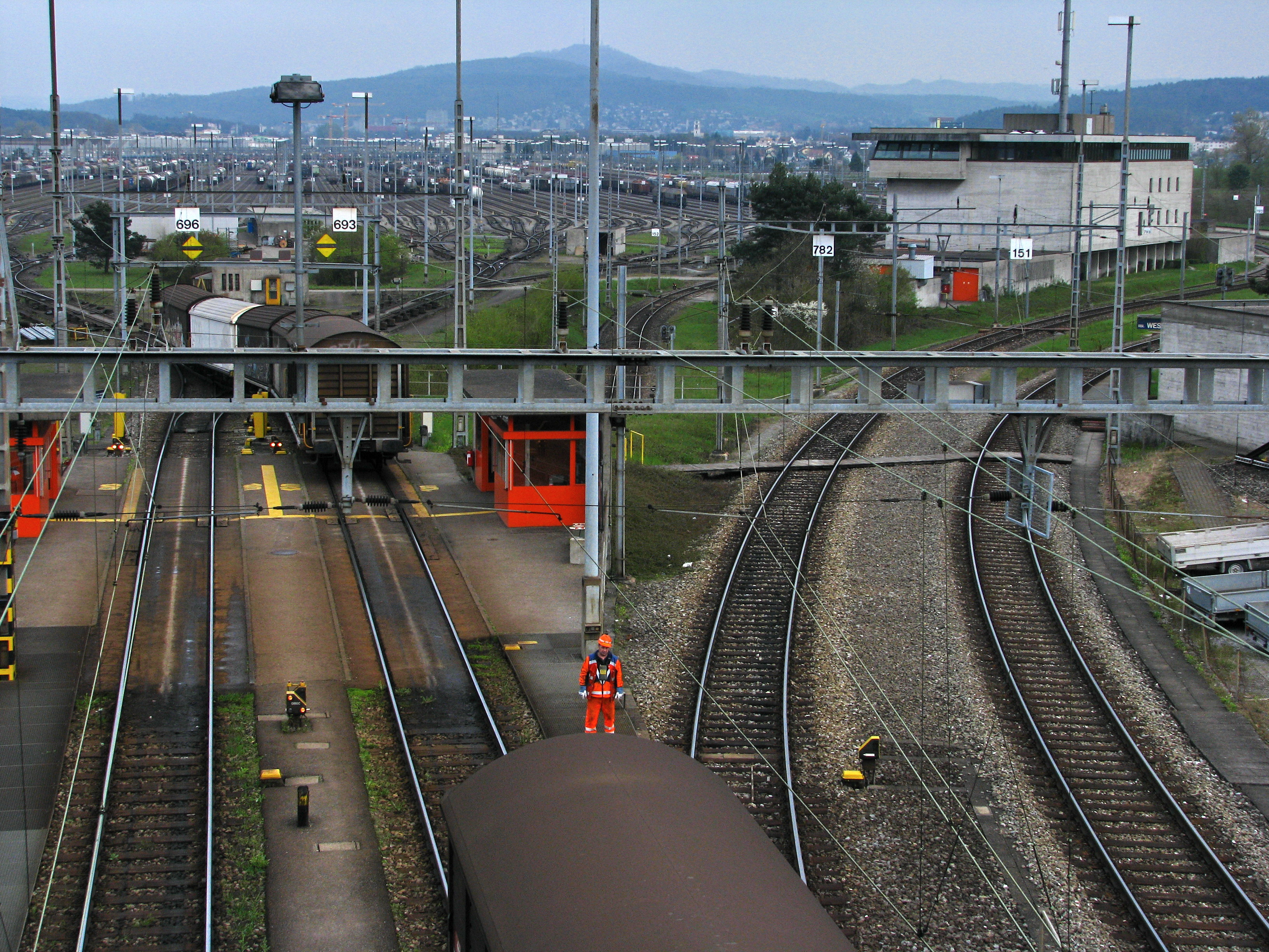 Rangierbahnhof Limmattal between Oetwil an der Limmat and Spreitenbach in the Limmat Valley (Switzerland).